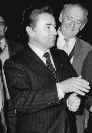 LPG Kerspleben, Besuch von Heinz Kuhrig ADN-ZB Ludwig 7-12-81 Bez. Erfurt: Über ihre Wettbewerbsziele für 1982 berieten die Genossenschaftsbauern der LPG Kerspleben, Kreis Erfurt-Land, gemeinsam mit ihrem Kooperationspartnern. An den Beratungen des Kooperationsrates nahm auch Heinz Kuhrig, Minister für Land-, Forst- und Nahrungsgüterwirtschaft der DDR, teil. Abgebildete Personen: Kuhrig, Heinz: Minister für Land-, Forst- und Nahrungsgüterwirtschaft der DDR ( PND 105604593 )